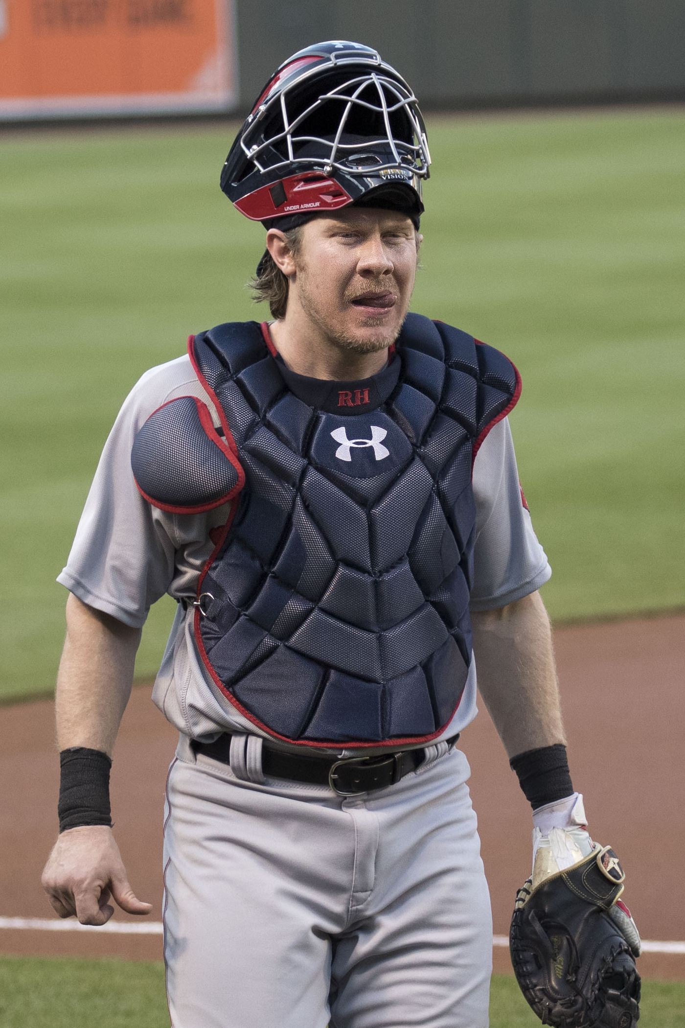 Ryan Hanigan